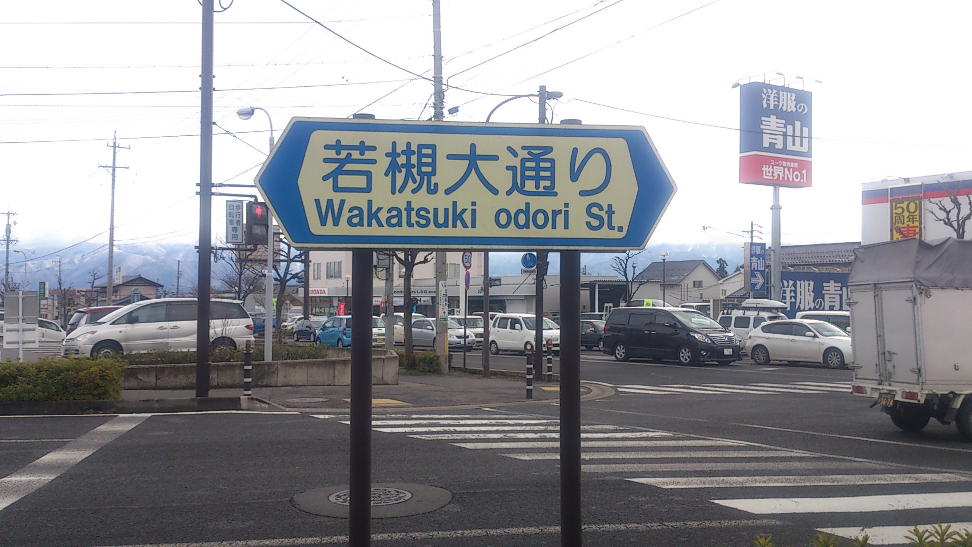 道路の通称名標識「若槻大通り」（長野県長野市稲田一丁目）